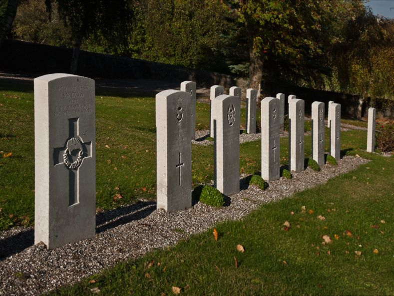 Mindelunden på Svinø kirkegård